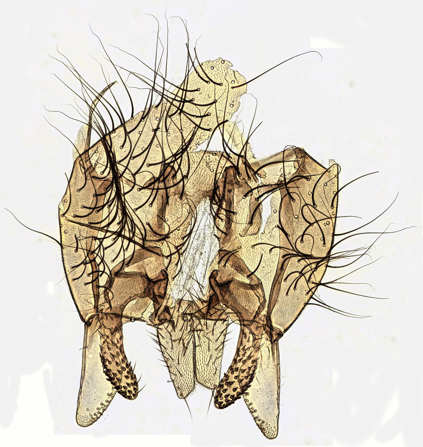 image description